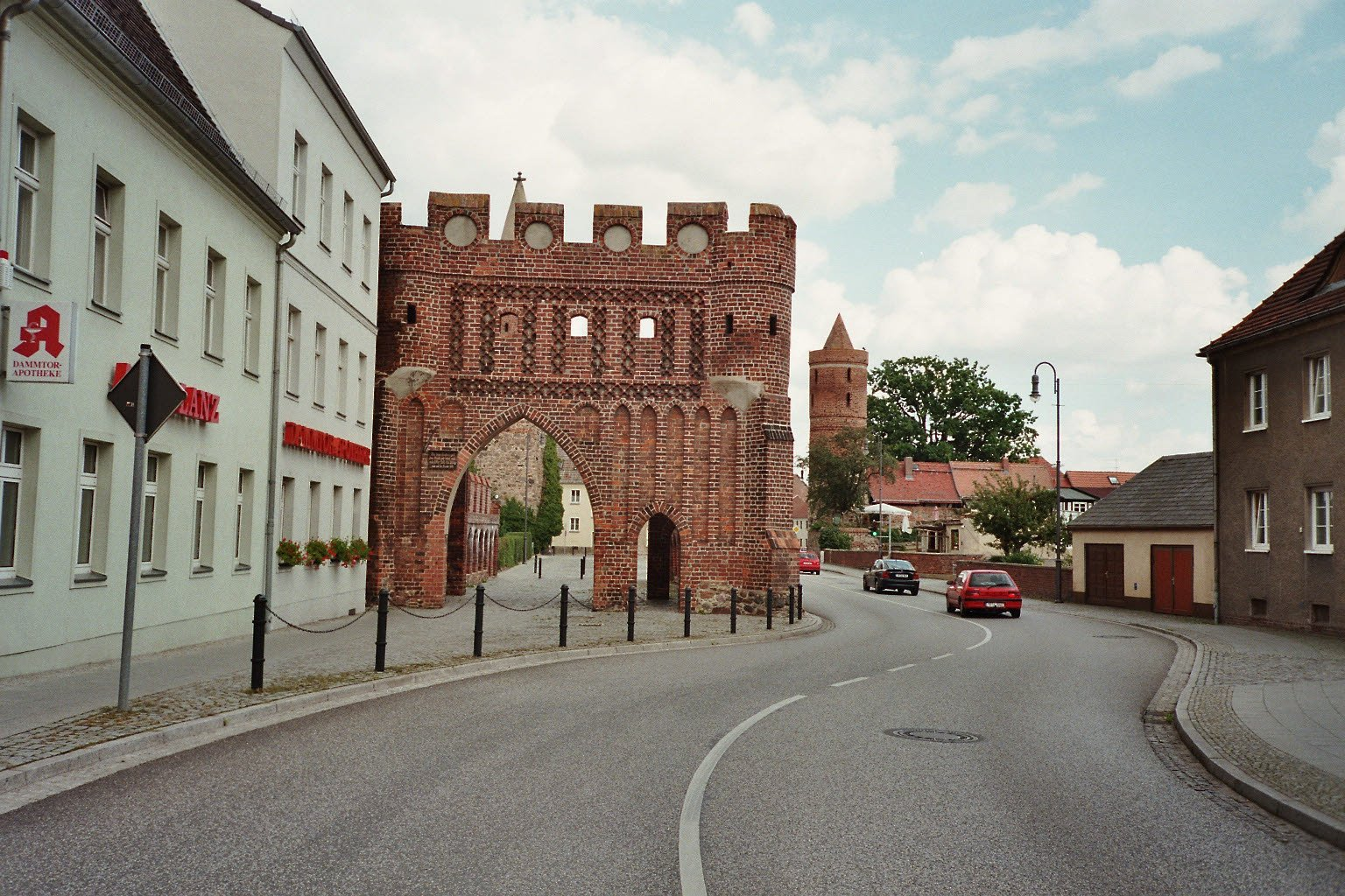 das Dammtor, eines der erhaltenen Stadtore von Jüterbog, Deutschland